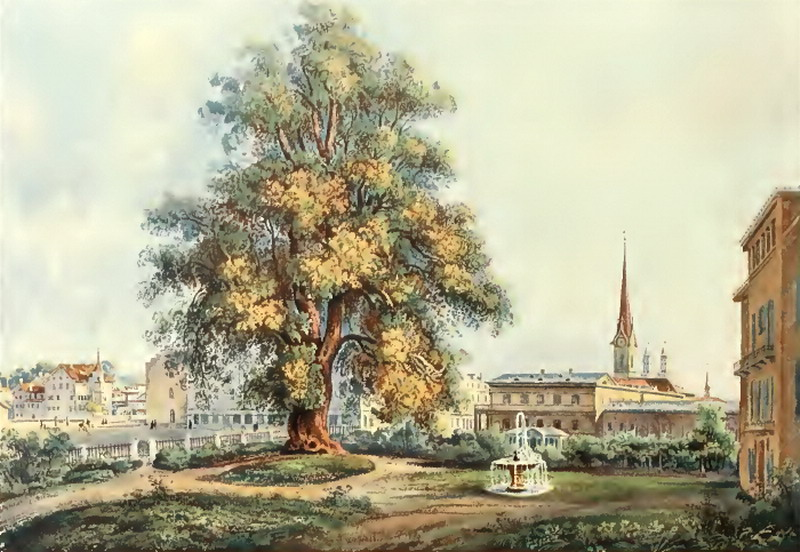 Tiefenhoflinde beim Paradeplatz innerhalb des Bürklischen Gartens zum "Tiefenhof", links "Windegg" (mit Turmanbau) und gelbes Zeughaus, in der Mitte Posthaus.